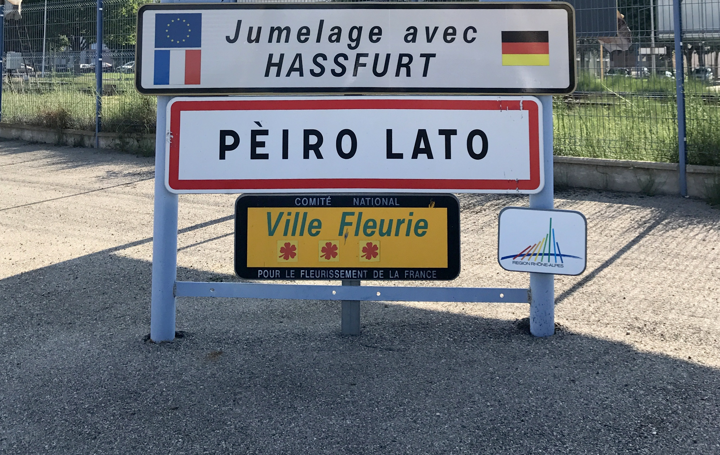 Panneau d'entrée dans Pierrelatte.